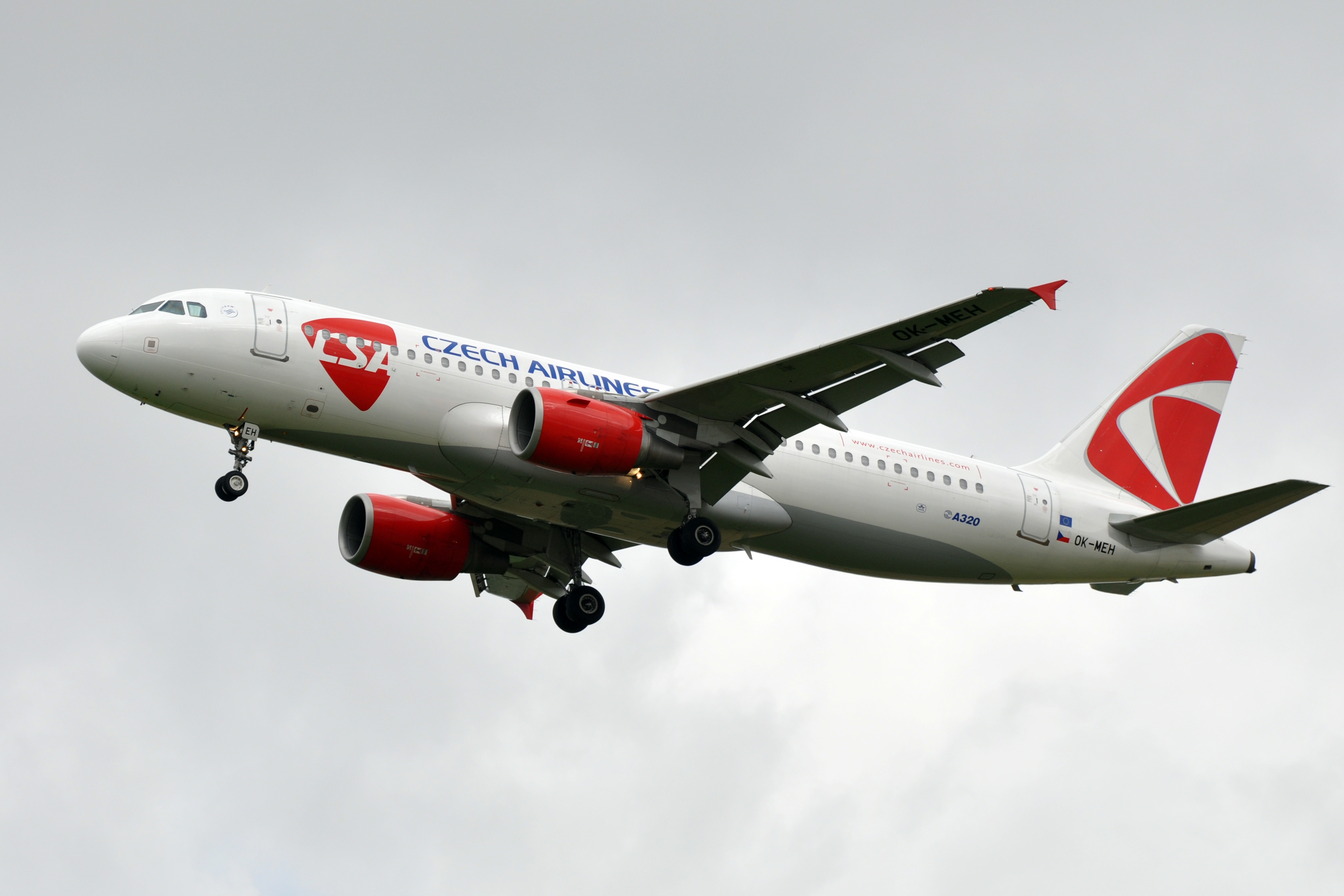 MSN 3031 A320-214 CSA CDG